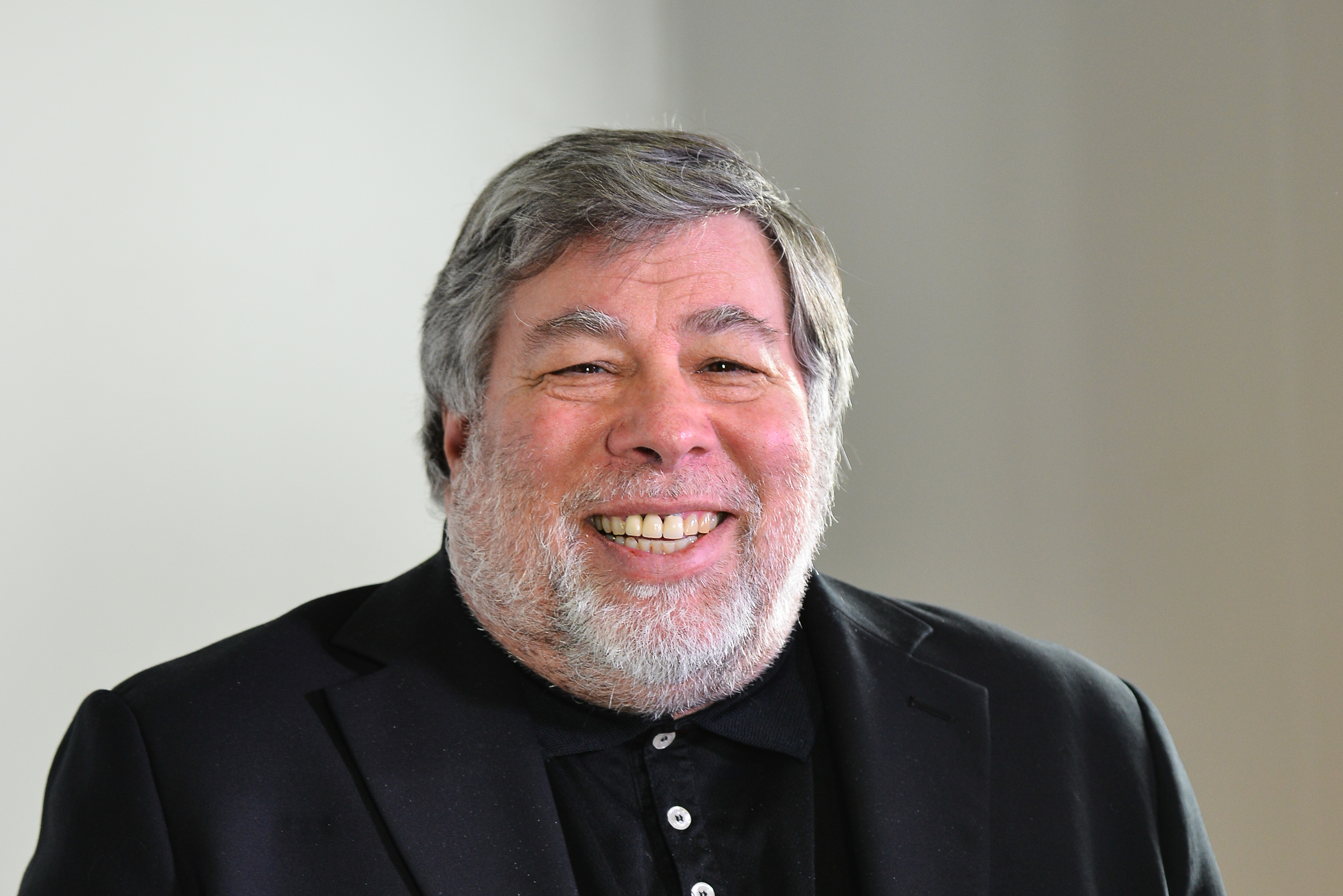 Steve Wozniak at World Business Forum 2014 in Milan (Italy)